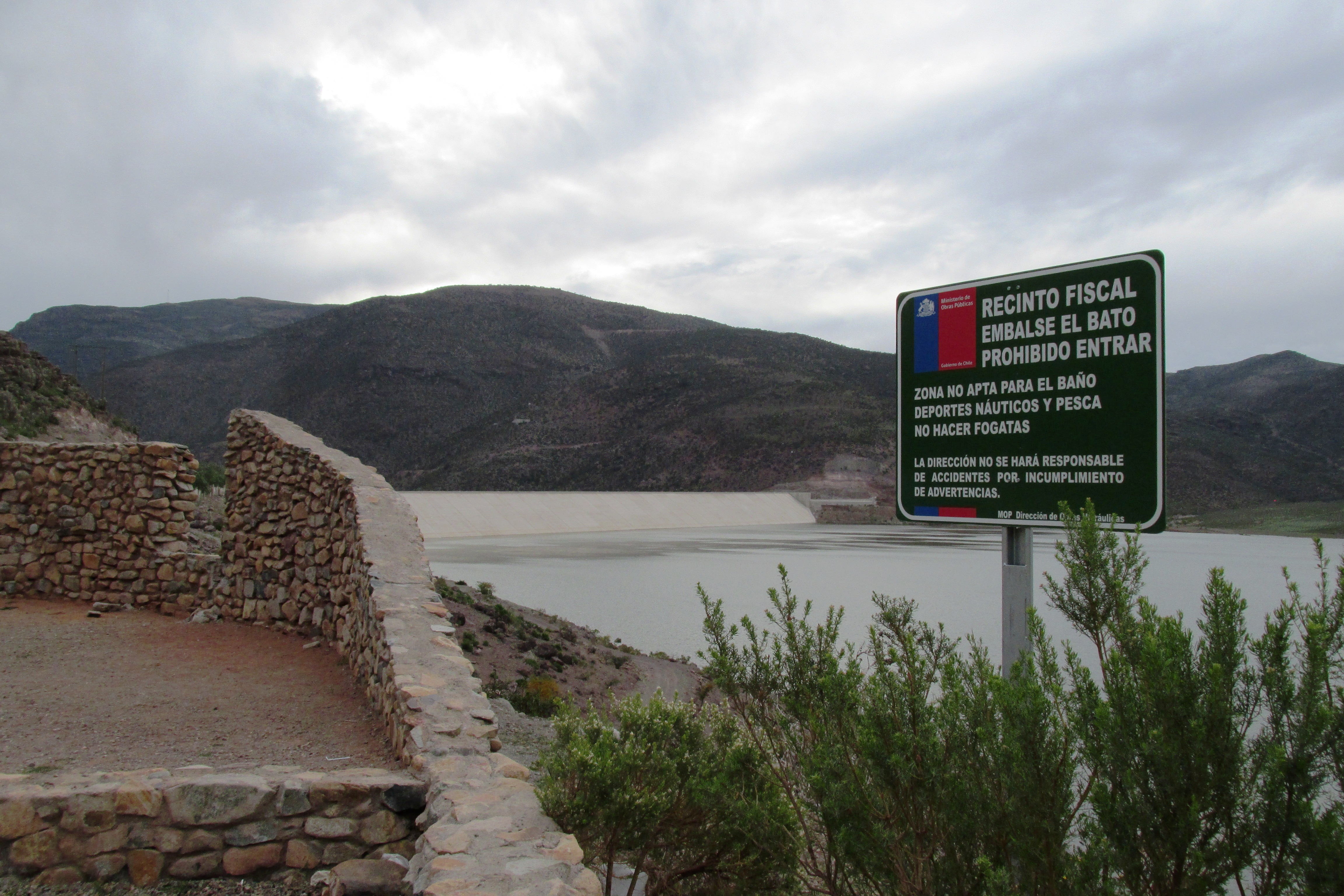 Embalse El Bato en la cuenca del Río Illapel